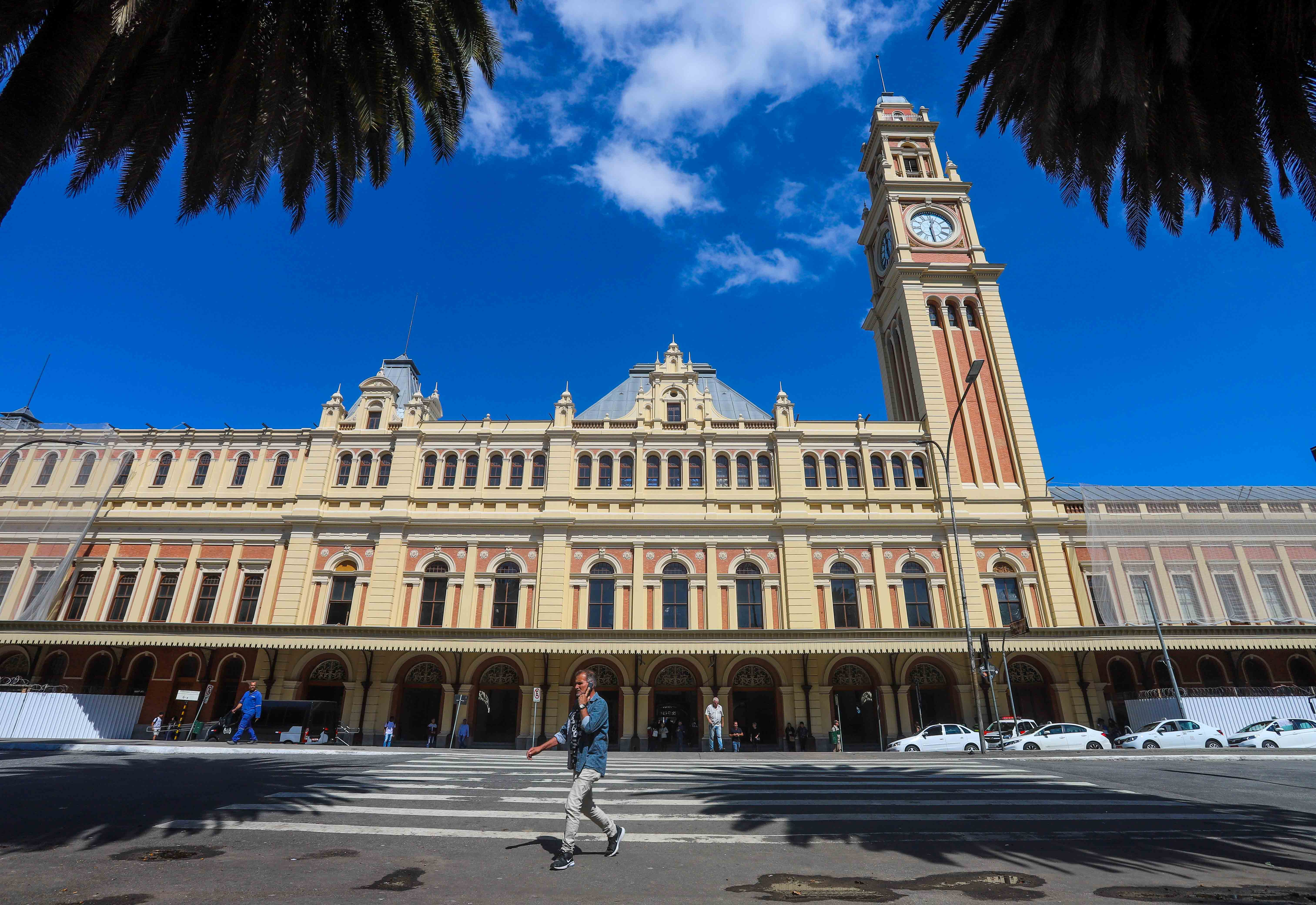 A Estação da Luz é uma das mais importantes estações ferroviárias da cidade de São Paulo. Seu projeto foi feito por Charles Henry Driver, um arquiteto britânico conhecido por projetos em estações ferroviárias. Local: São Paulo/SP Data: 09/08/2018 Foto: Governo do Estado de São Paulo